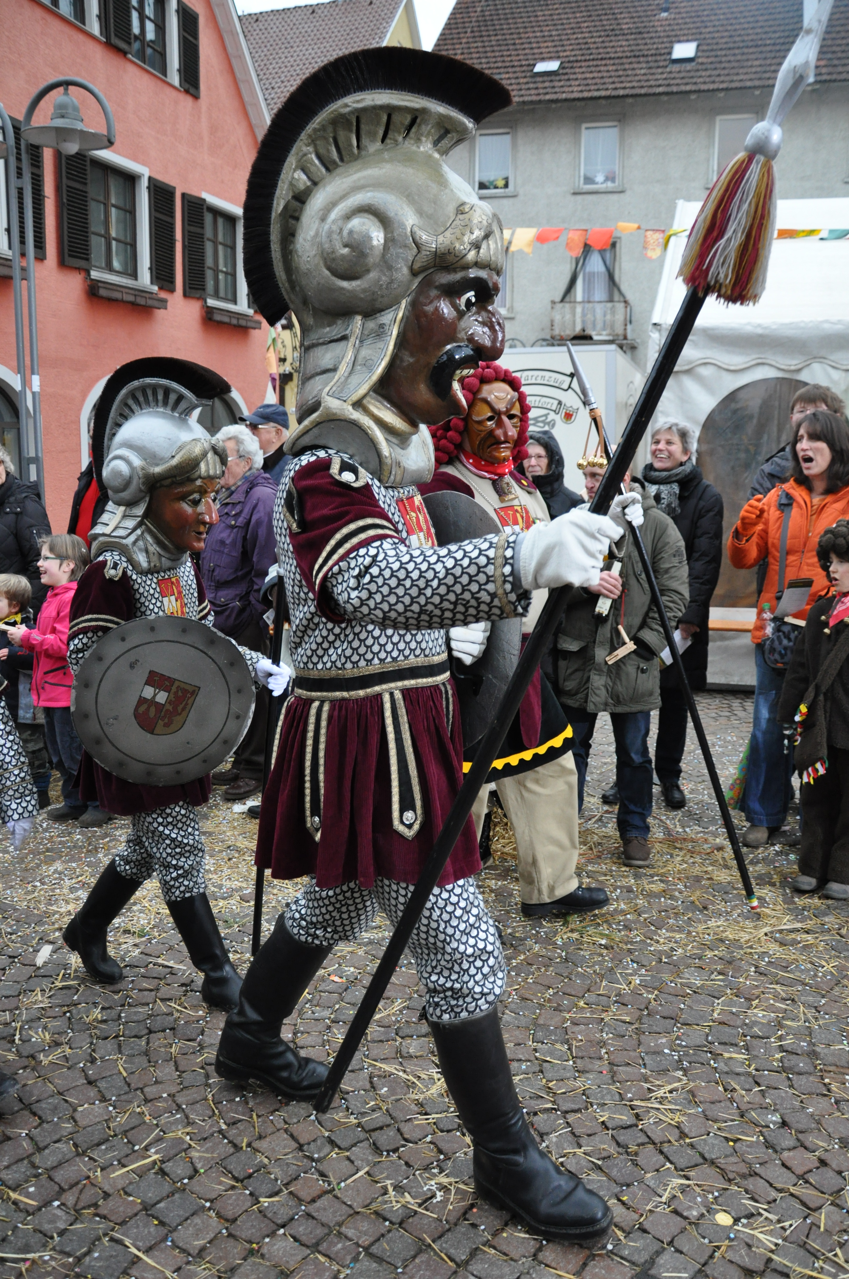 Narrenzunft Gole 1865 e. V., Riedlingen; Narrenfigur: Riese „Neuer Gole“ Fotografiert beim Landschaftstreffen der Vereinigung Schwäbisch-Alemannischer Narrenzünfte (VSAN) 2014 in Tettnang; Narrensprung am Sonntag, 16. Februar 2014